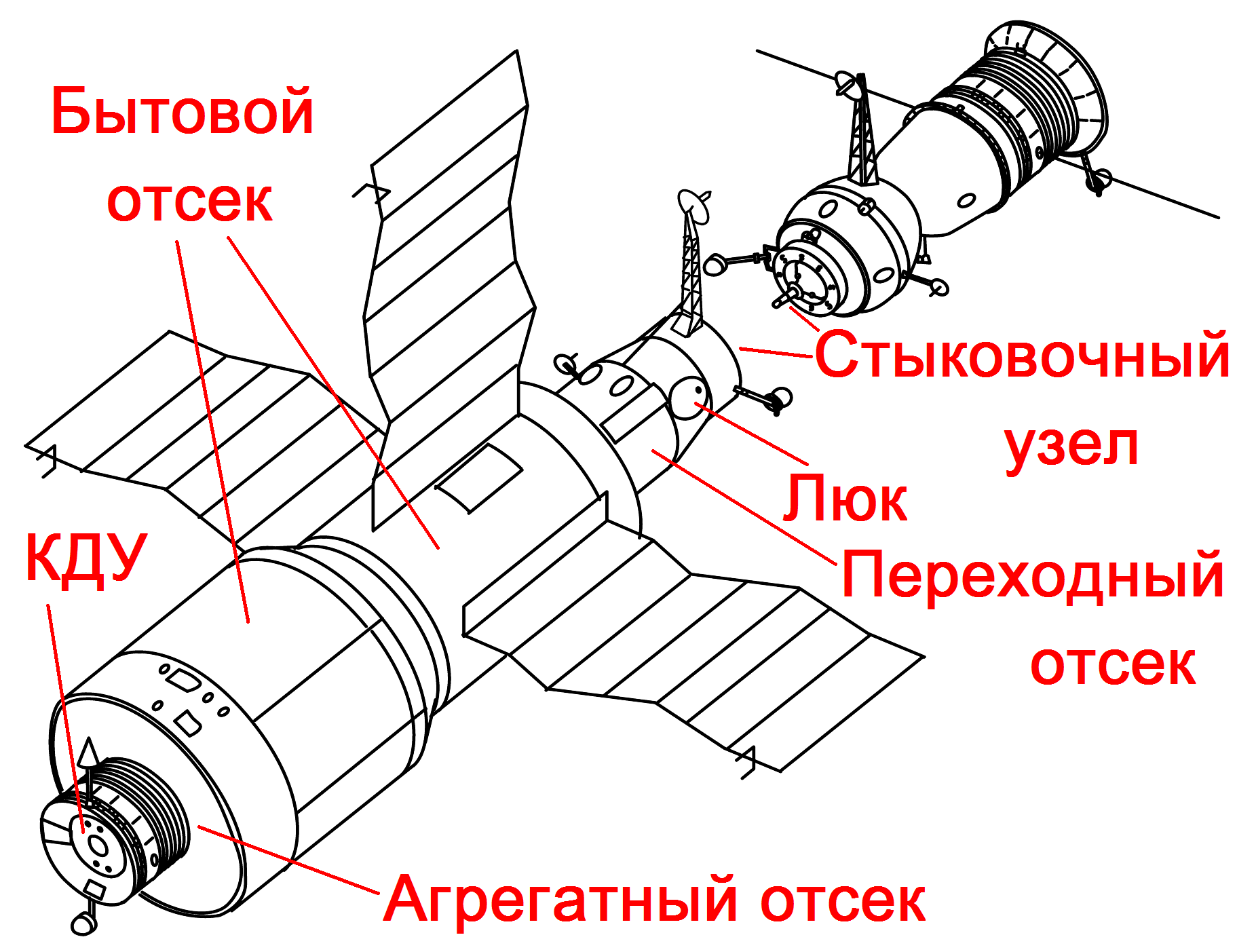 Салют-4 и Союз -17 или Союз-18 или Союз-20